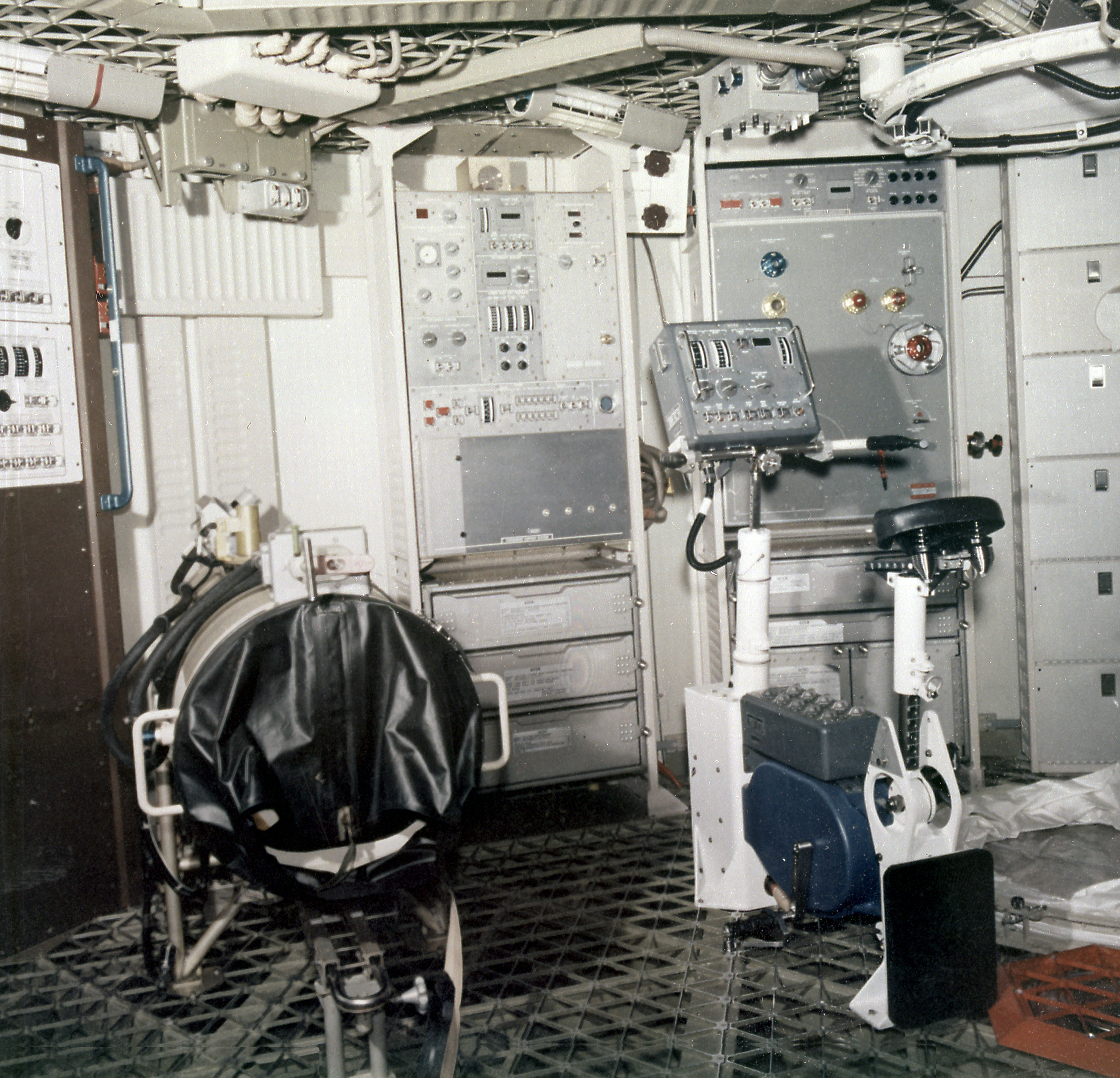 Internal Arrangement of the Skylab Orbital Workshop